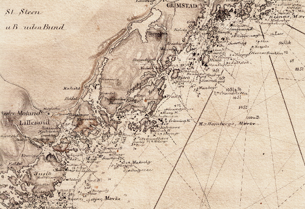 Sjøkart over kysten fra Grimstad til Lillesand fra 1856. Håndtegnet av Schie i målestokk 1:200 000. Original karstørrelse ca 86 x 63 cm. Et eksemplar befinner seg hos Statens kartverk Sjø i Stavanger.